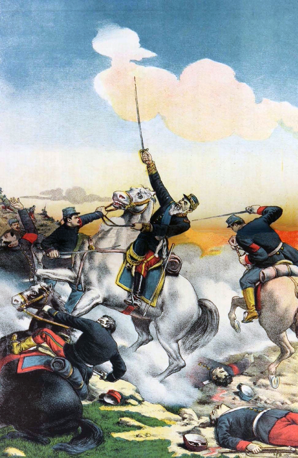 Litografia de la muerte de Orozimbo Barbosa (* Chillán, Región del Biobío, Chile, 1838 - † Placilla de Peñuelas, Región de Valparaíso, Chile, 28 de agosto de 1891)